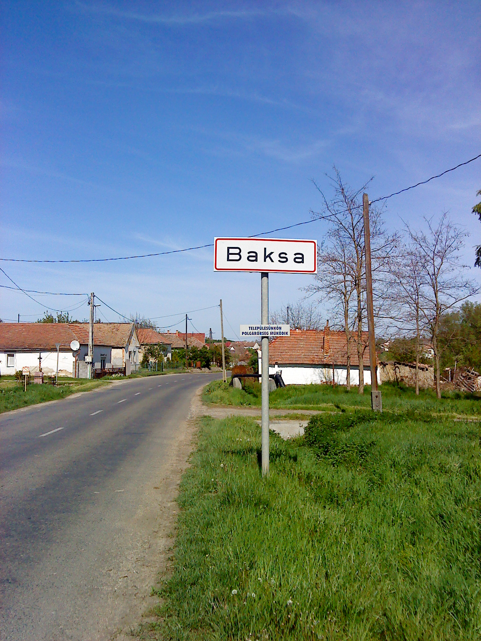 Baksa nyugatról